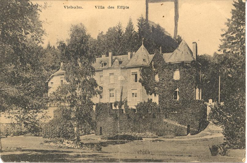 villa Les Effâts à VIELSALM, propriété d'Alfred JANSSEN, époux BATTAILLE. (Située rue de la Grotte 11, à 6690 Vielsalm, Belgique). I) Anne Marie STRAATMAN, née septembre 1830 à Malines dans une péniche « door tijds omstandigheden », qui épousa le 1 févr. 1853 Jean Charles BATTAILLE, ingénieur, chevalier de l’ordre de Léopold, de l’ordre de Saint-Stanislas, de l’Ordre de Sainte-Anne de Russie, de l’ordre de Saint-Alexandre de Bulgarie, né à Saint-Josse-ten-Noode le 14 février 1830 décédé au large d’Alexandrie (Egypte) le 16 avril 1889, fils de Pierre-Michel, 1801-1886, receveur des contributions honoraire, et de Jeanne-Françoise Strauch, 1806-1880. Dont: II) Albert Pierre Joseph BATTAILLE, ingénieur, épousa Françoise Elisabeth SOUBRE. Dont: III) Marguerite Marie Charlotte BATTAILLE, née à Liège le 30 août 1881 et décédée à Liège le 16 juin 1962, munie des secours de la religion (adresse: 19, boulevard d'Avroy), épousa à Liège (Ougrée), le 14 mars 1900, Alfred Charles Hubert Jules JANSSEN, ingénieur, né à Cologne le 11 octobre 1864, (ils habitaient Les Effâts à Vielsalm) et veuve épousa en secondes noces Albert COURARD, décédé à Vielsalm le 13 juillet 1961 aux Effats. Dont: a) Maurice Raymond Hubert Albert JANSSEN né à Ougrée (Liège), le 21 décembre 1900. b) Pierre Georges Henri Hubert JANSSEN né à Liège le 26 décembre 1908.